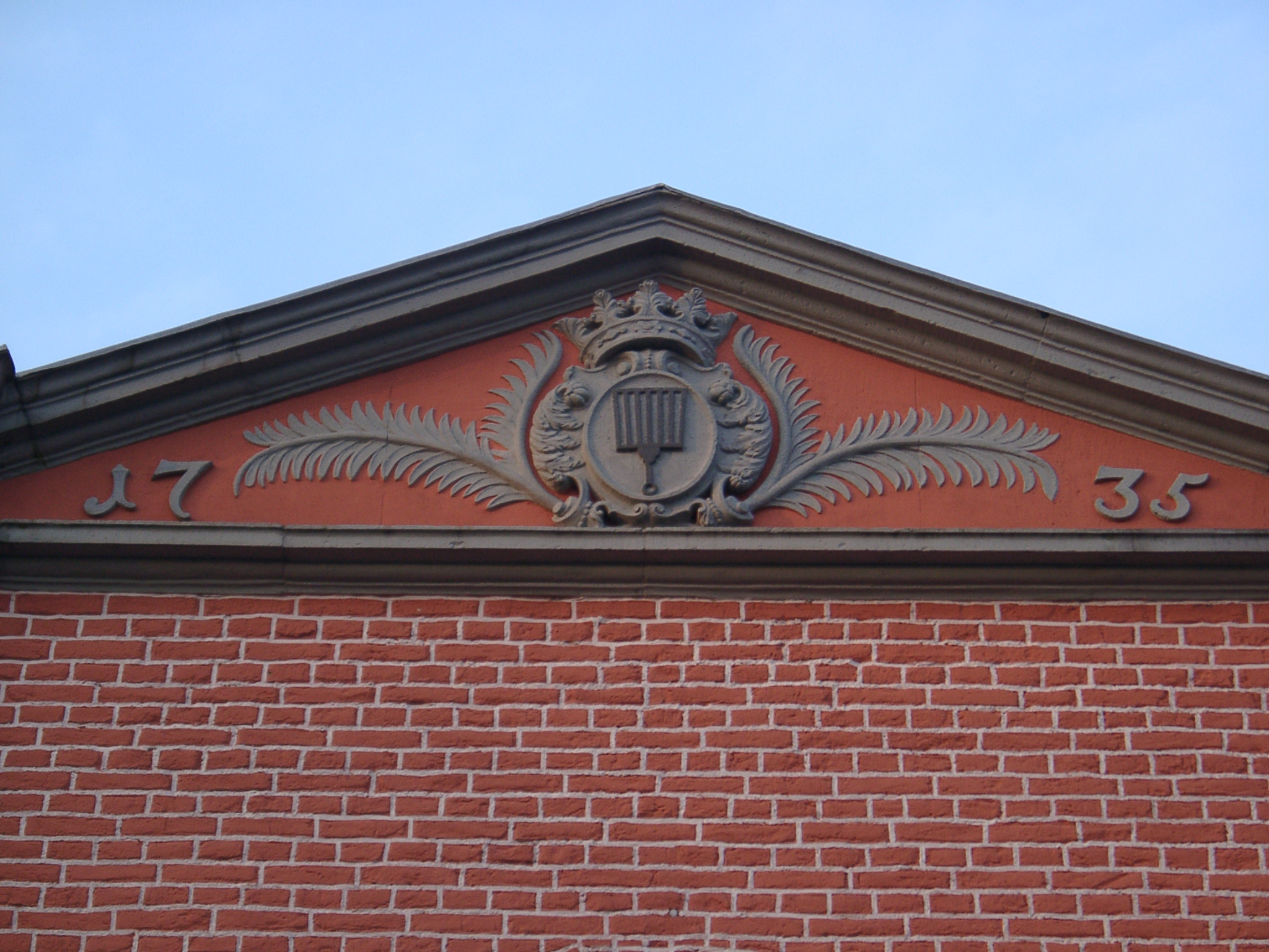 Wappen am Haus Meer